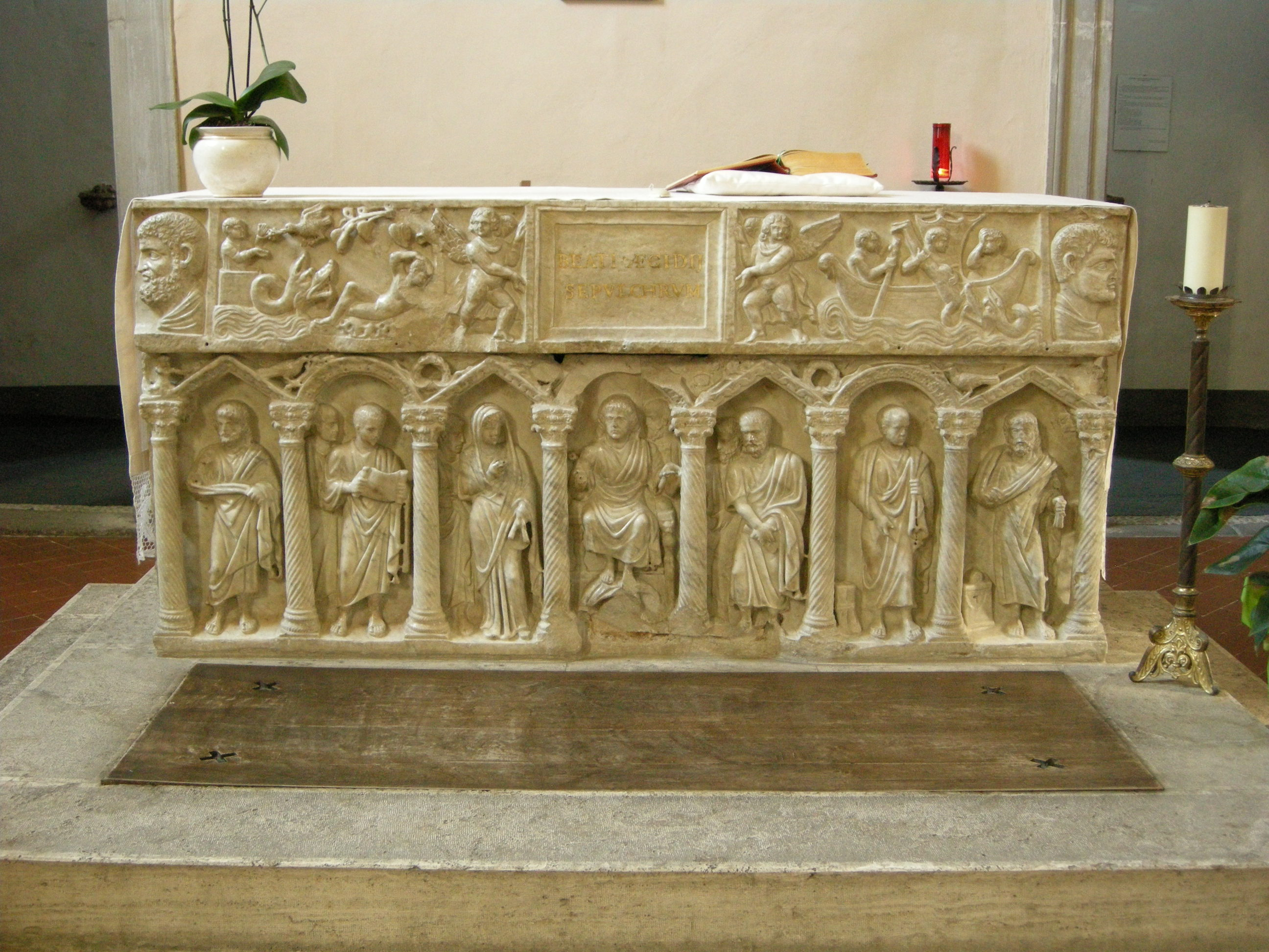 Perugia, oratorio di san bernardino, interno 04 altare